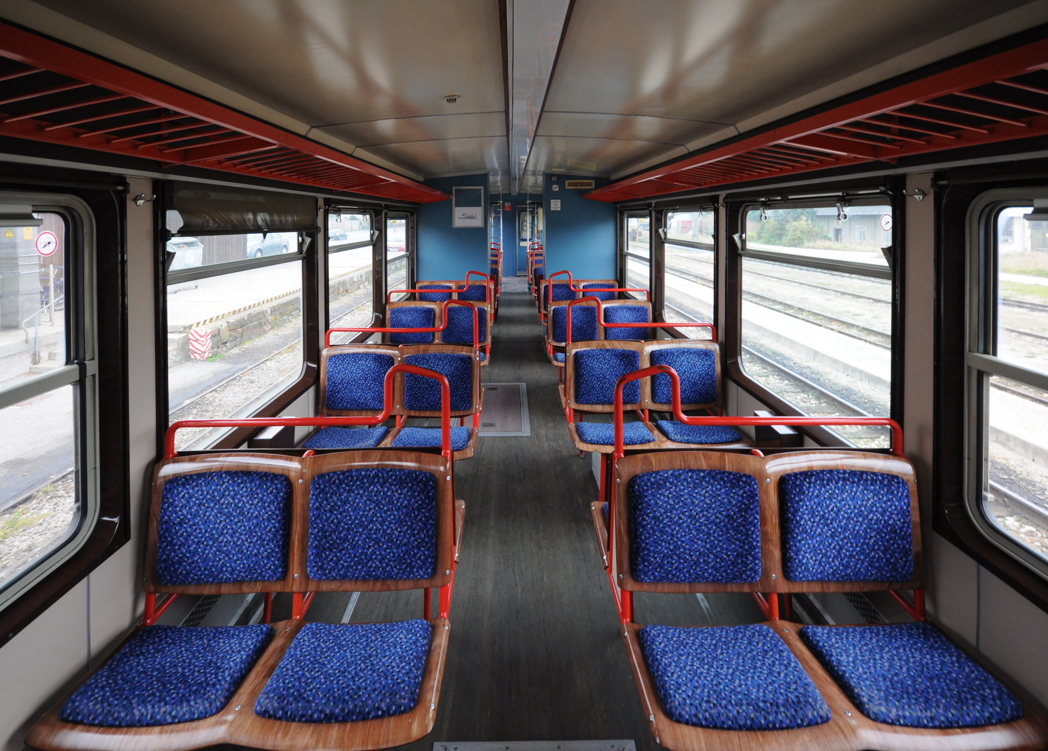 Fahrgastraum eines Triebwagens der Reihe 5090